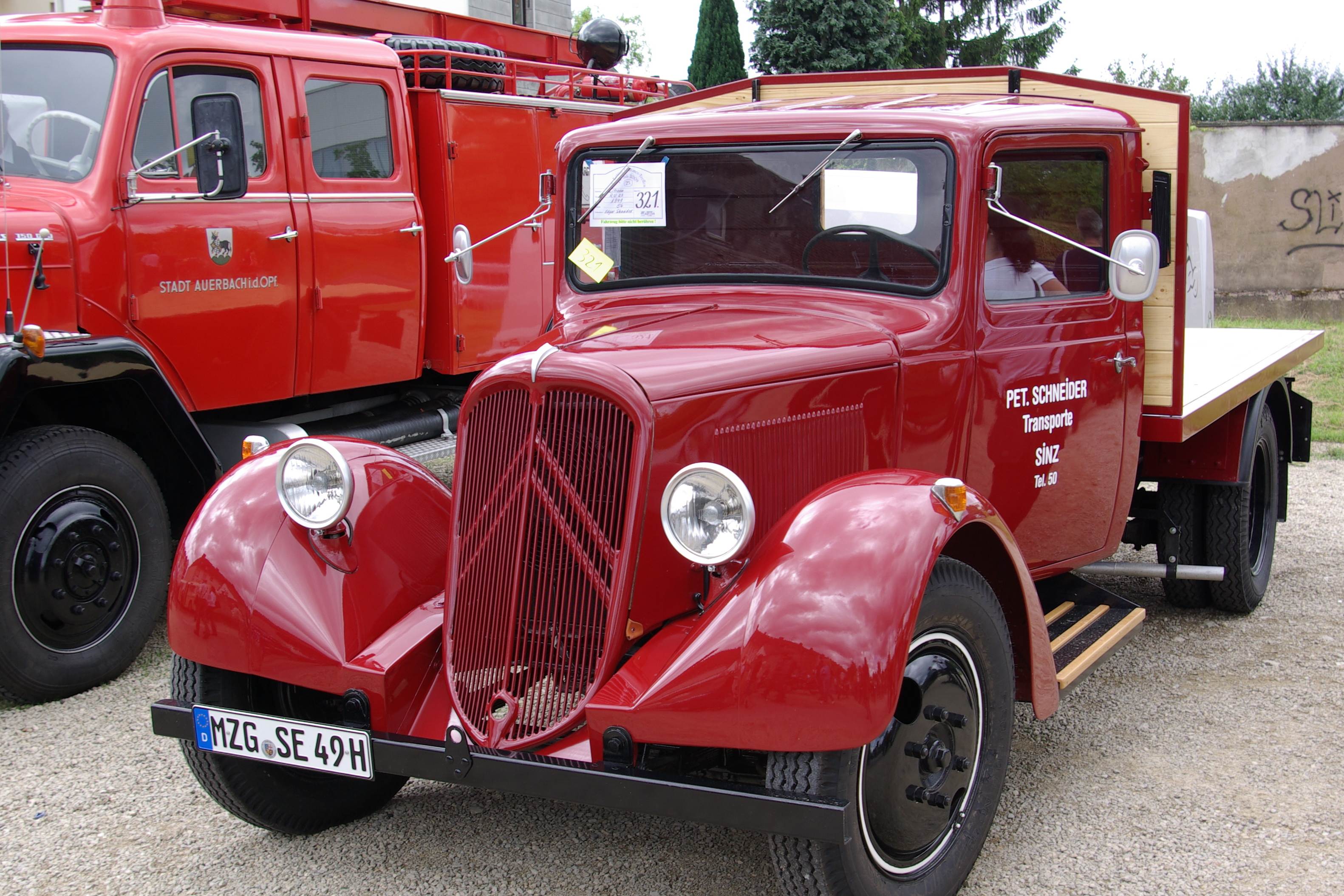 Citroen U 23, Baujahr 1949, 56 PS